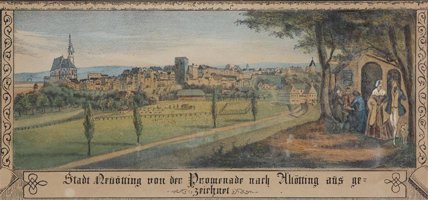 Stadtansicht Neuöttings von Süden, Ausschnitt aus der Lithografie von Josef Günther, 1848, Stadtmuseum, Inv.Nr. 01137